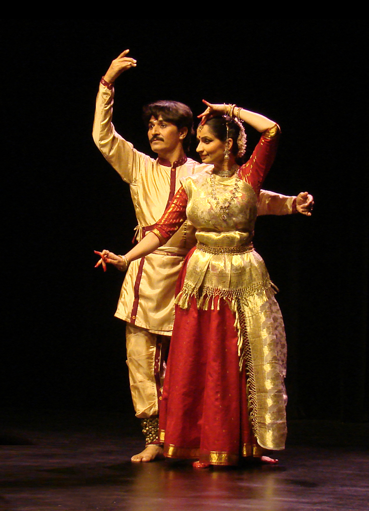 Danse Kathak, Sharmila Sharma et Rajendra Kumar Gangani et leurs musiciens samedi 24 Novembre 2007 au musée Guimet (Paris)